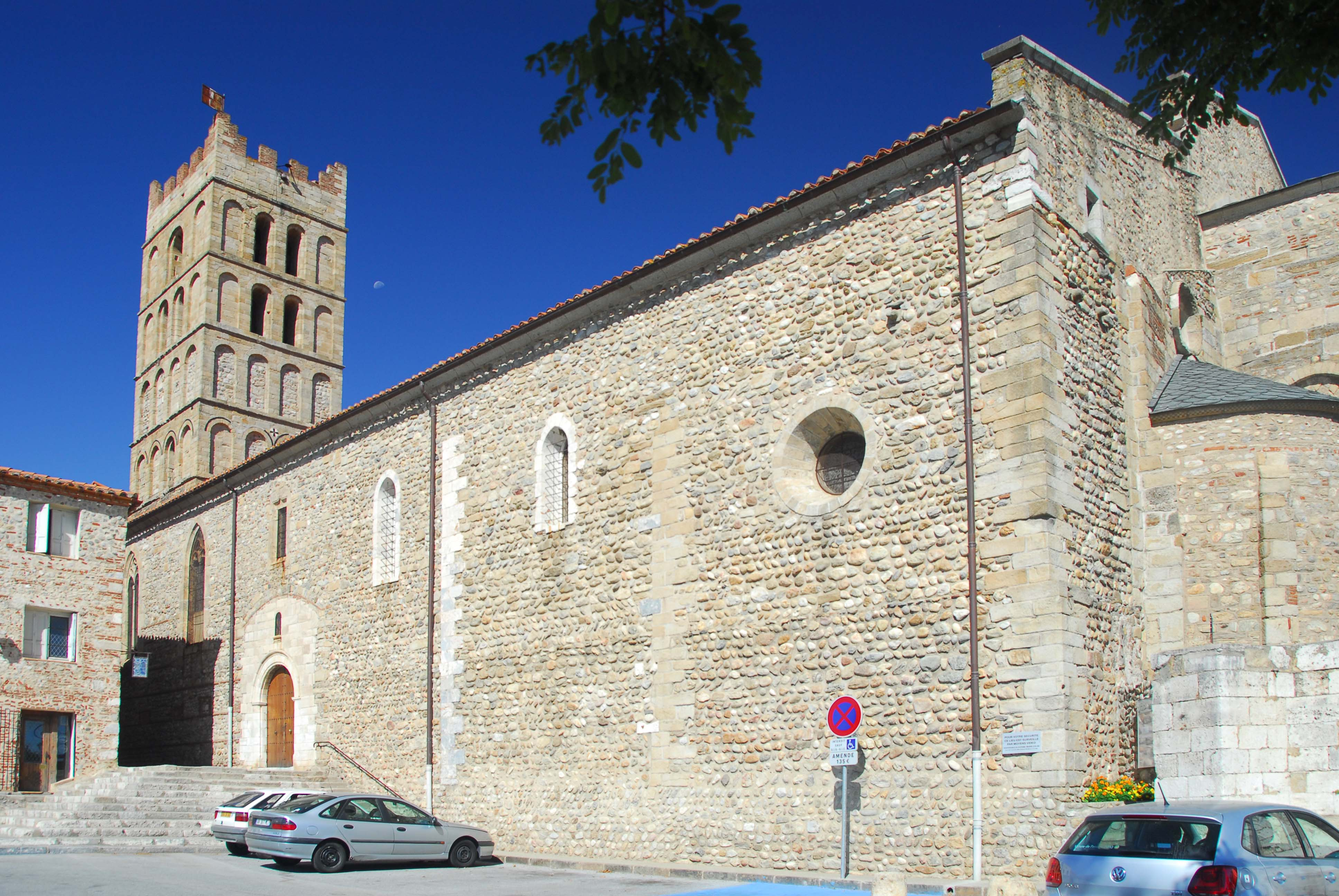 Ste-Eulalie-et-Ste-Julie_d’Elne, Südseite